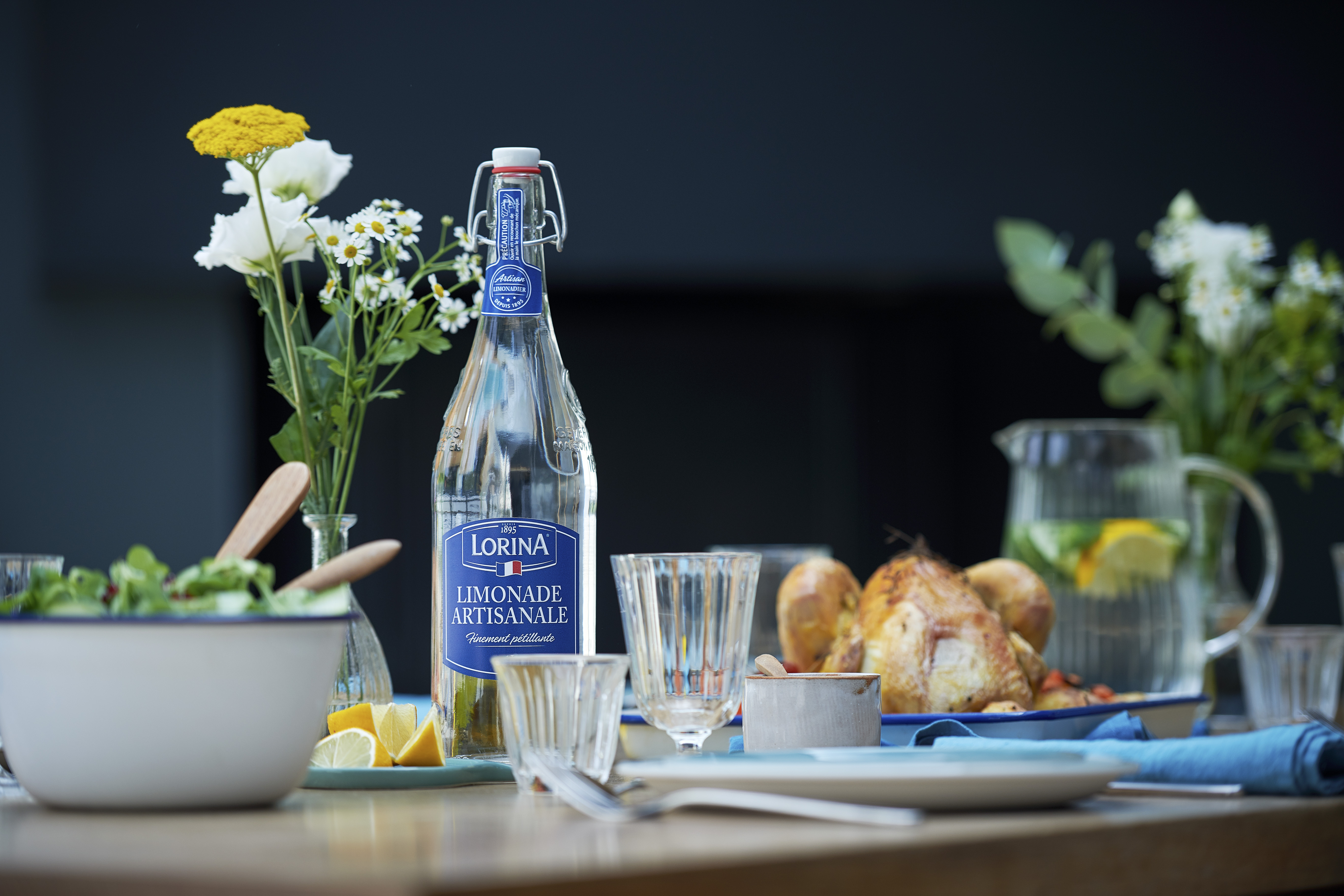 La bouteille iconique Lorina, des ingrédients inchangés depuis 1895.